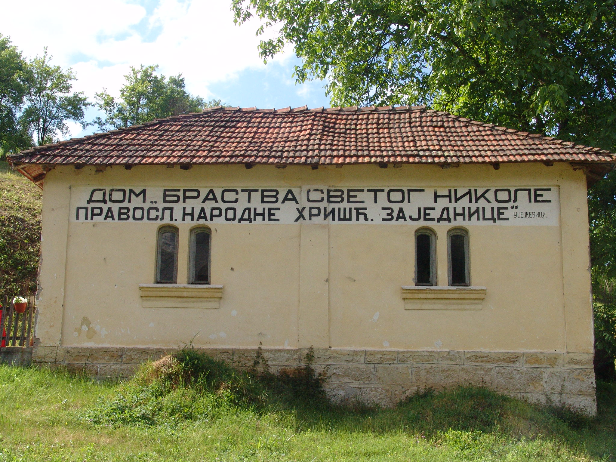 Стари конак манастира Јежевица.